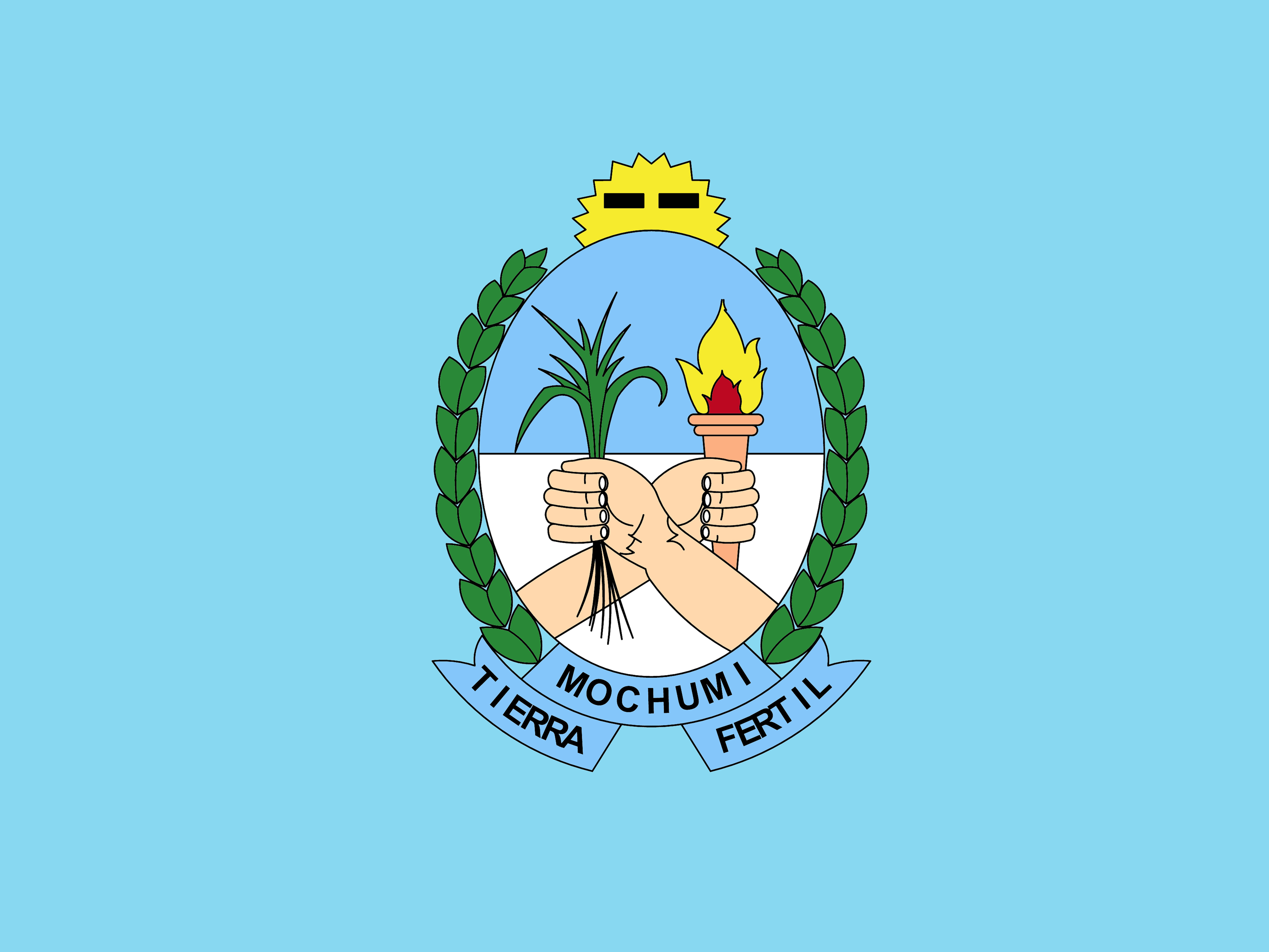 Bandera del distrito de Mochumí